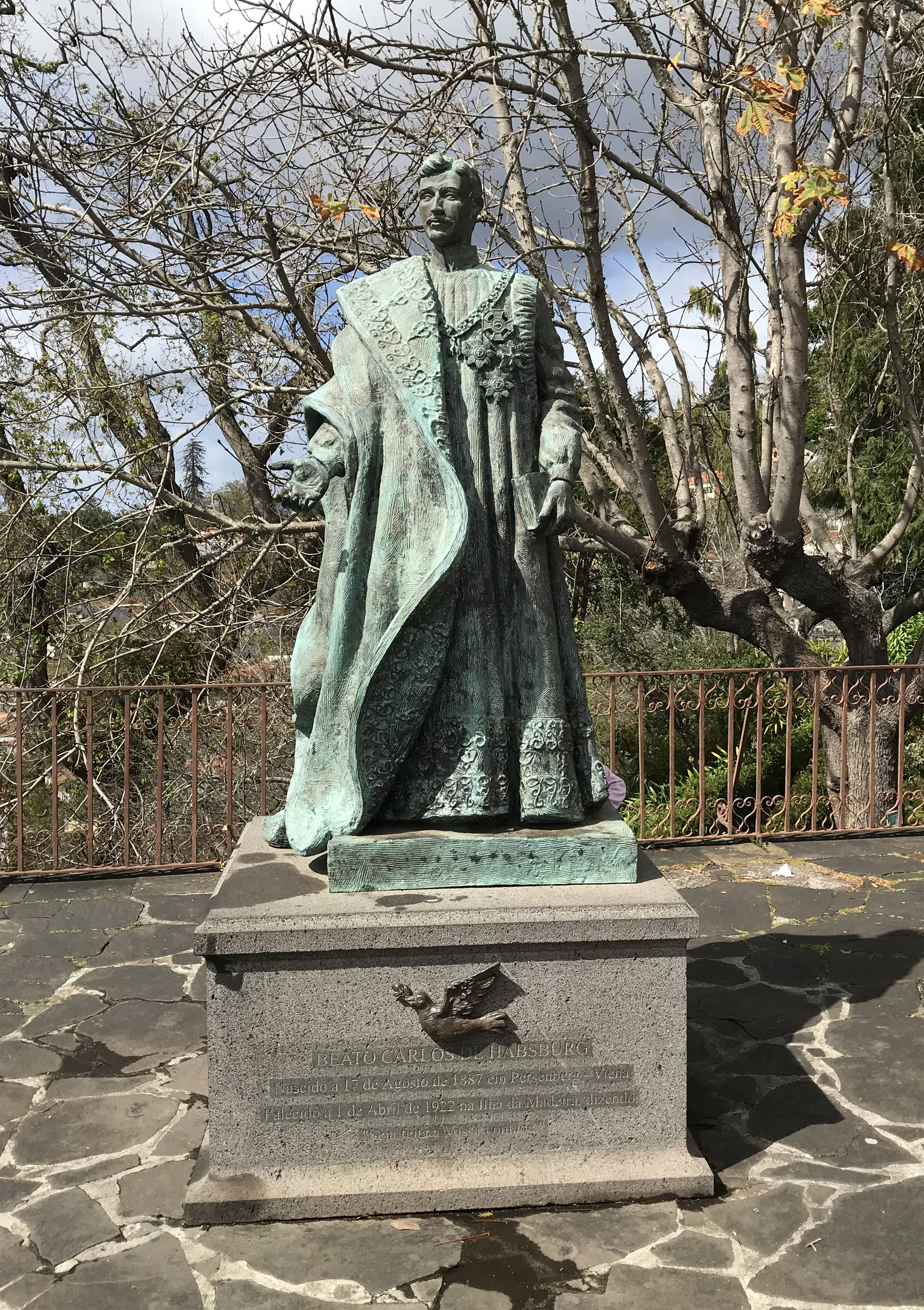 Statue von Kaiser Karl I. von Österreich-Ungarn vor der Wallfahrtskirche Nossa Senhora do Monte auf Madeira, in der er bestattet ist. Bildhauer: Augusto Cid, 2005. Inschrift: BEATO CARLOS DE HABSBURG | Nascido a 17 de Agosto de 1887 em Persenberg [sic!] - Vienna | Falecido a 1 de Abril de 1922 na Ilha da Madeira dizendo | "Seja feita a Vossa vontade" Der selig gesprochene Karl von Habsburg | Geboren am 1. April 1887 in Persenbeug - Wien | Gestorben am 1. April 1922 auf der Insel Madeira mit den Worten | "Dein Wille geschehe"